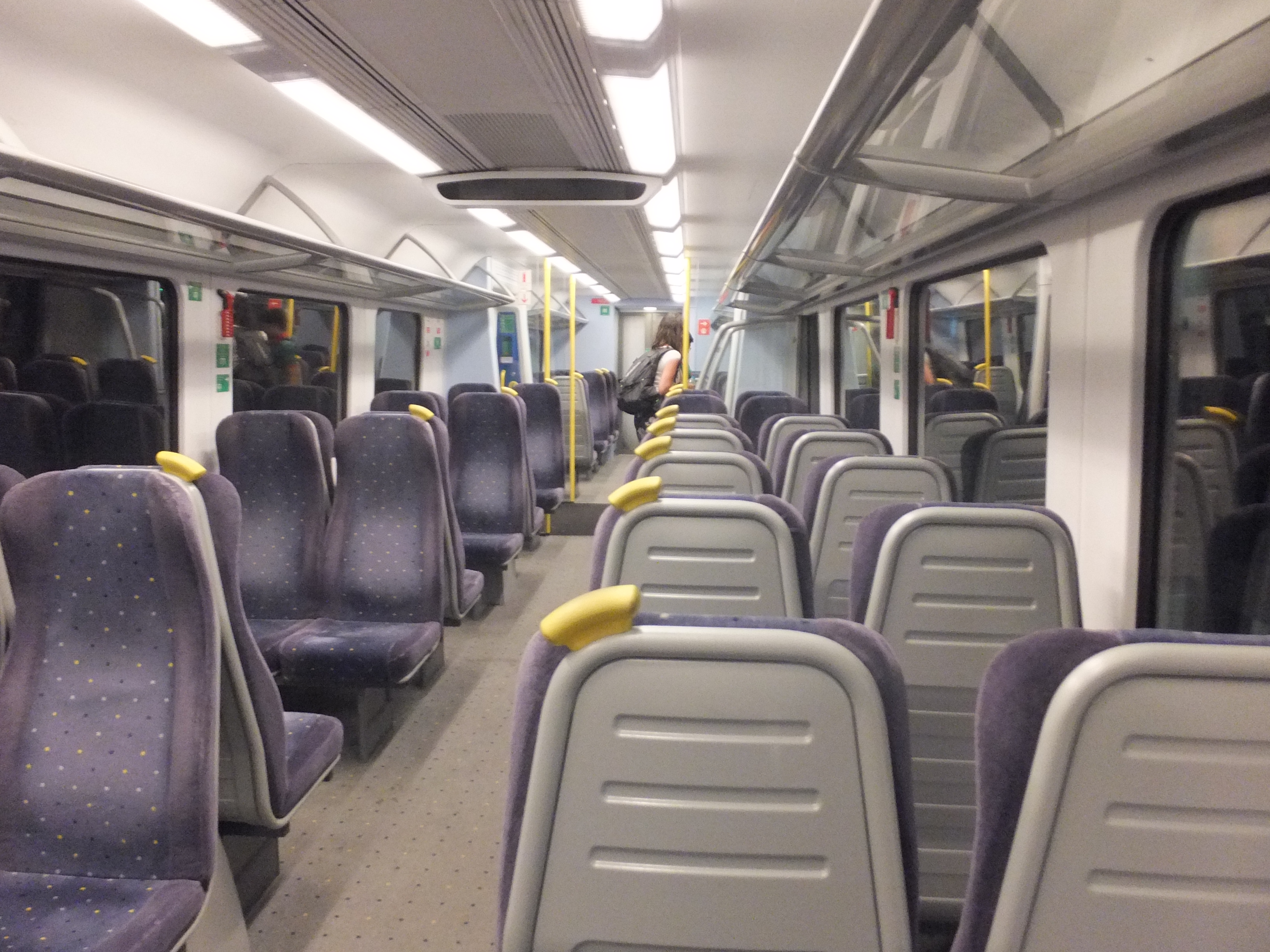 バンコク、エアポート・レール・リンクのエクスプレス用車両、車内。